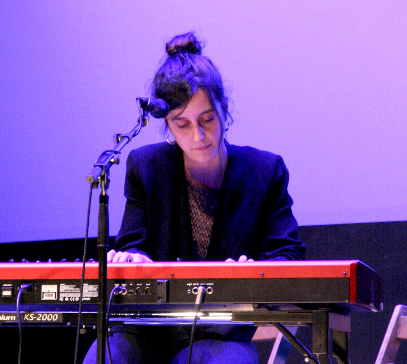 Al capdavall som bàrbars. Homenatge a Joan Oliver realitzat el 30 de novembre de 2016 al Teatre de la Faràndula de Sabadell.